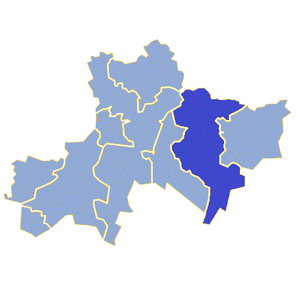 Powiat żagański - Gmina Szprotawa